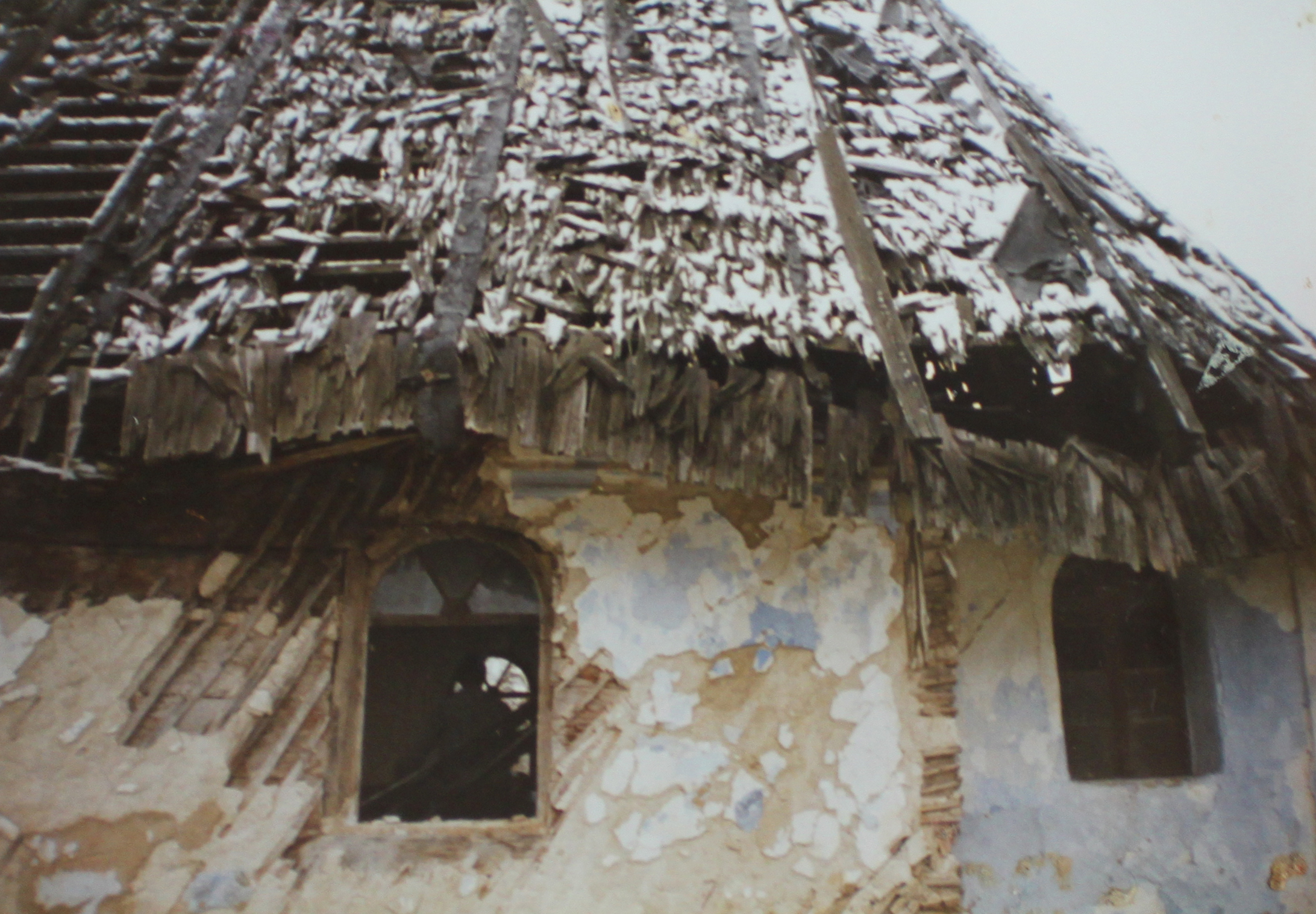 Biserica de lemn din Solona, judeţul Sălaj.